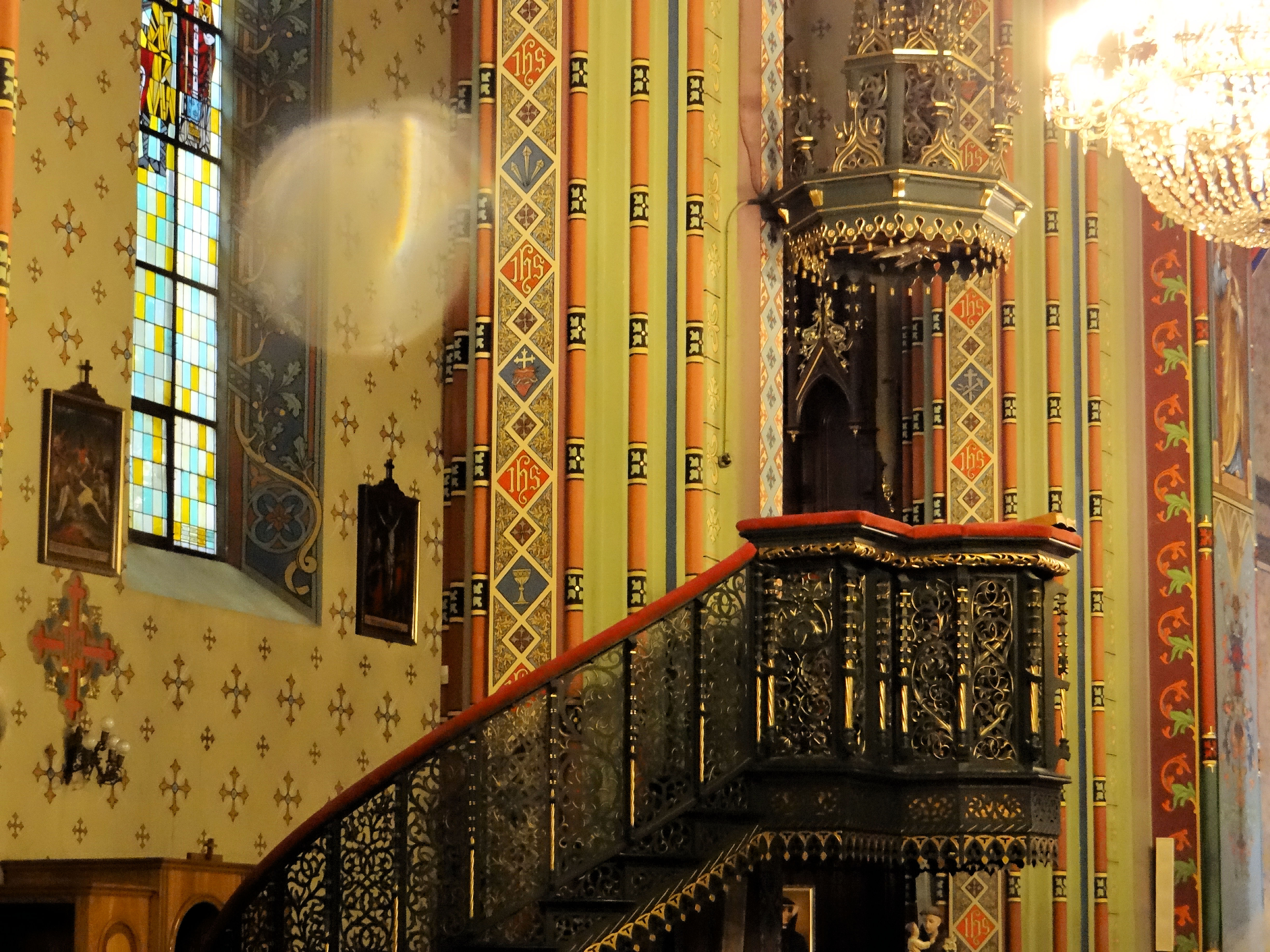 Kościół Podwyższenia Świętego Krzyża w Kole - ambona